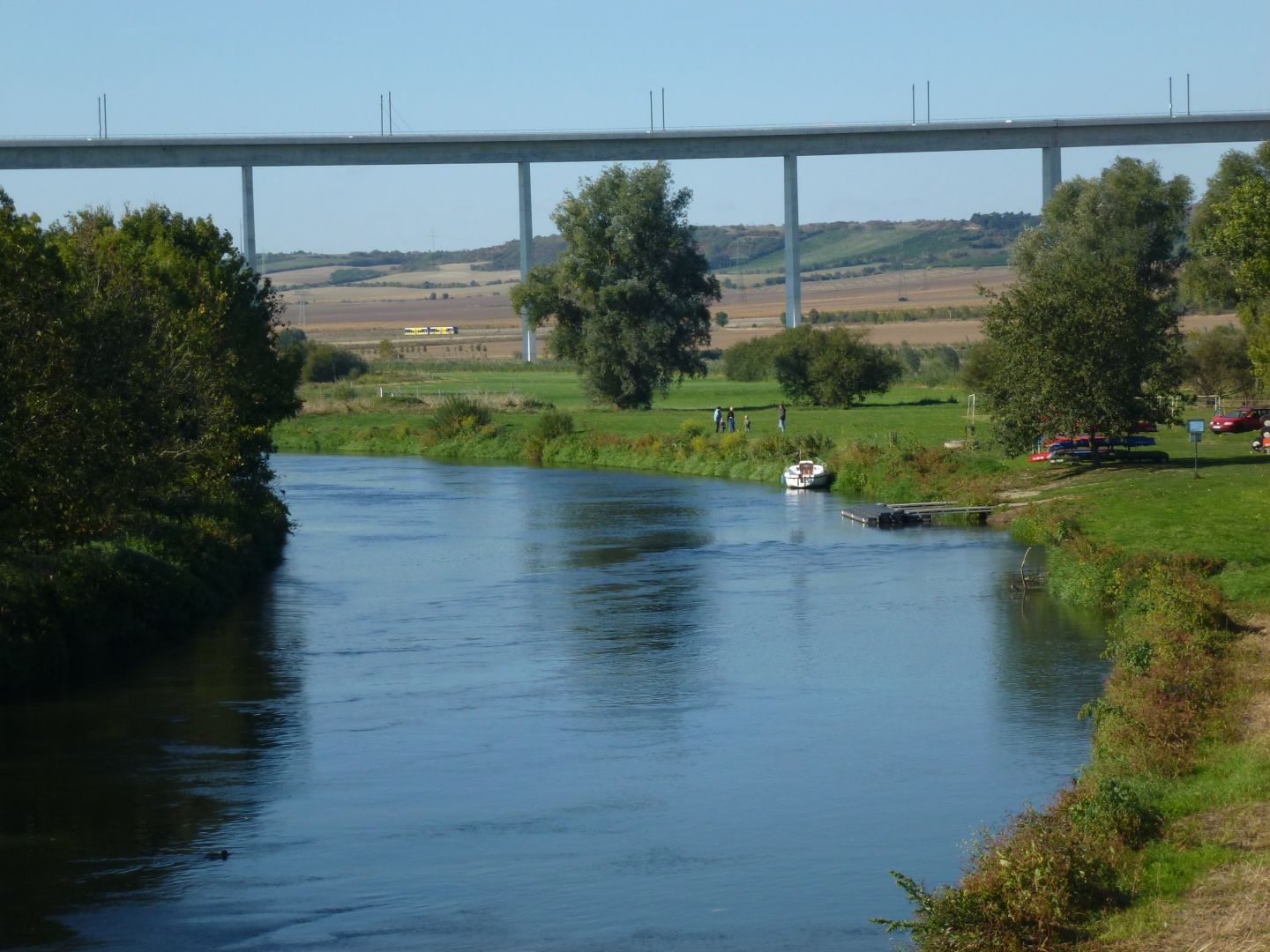 Kanustation an der Unstrut in Karsdorf, im Hintergrund die Unstruttalbrücke und die Unstrutbahn